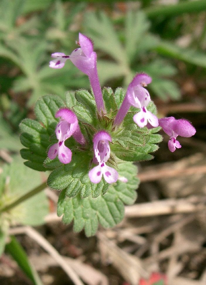 Lamium amplexicaule